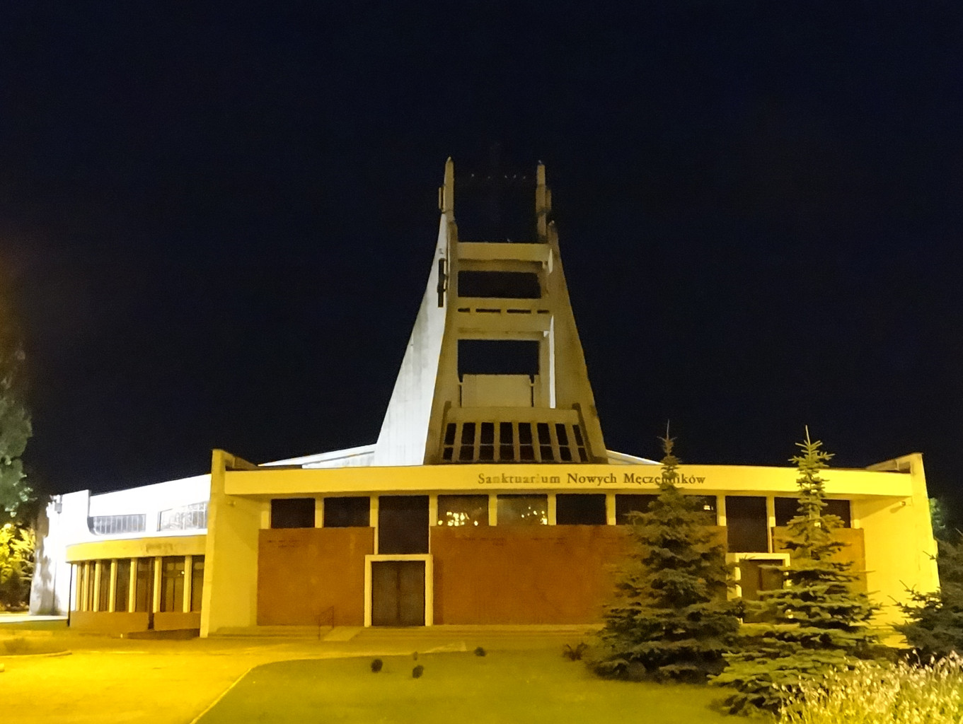 Kościół p.w. Świętych Polskich Braci Męczenników w Bydgoszczy na osiedlu Wyżyny, Sanktuarium Nowych Męczenników